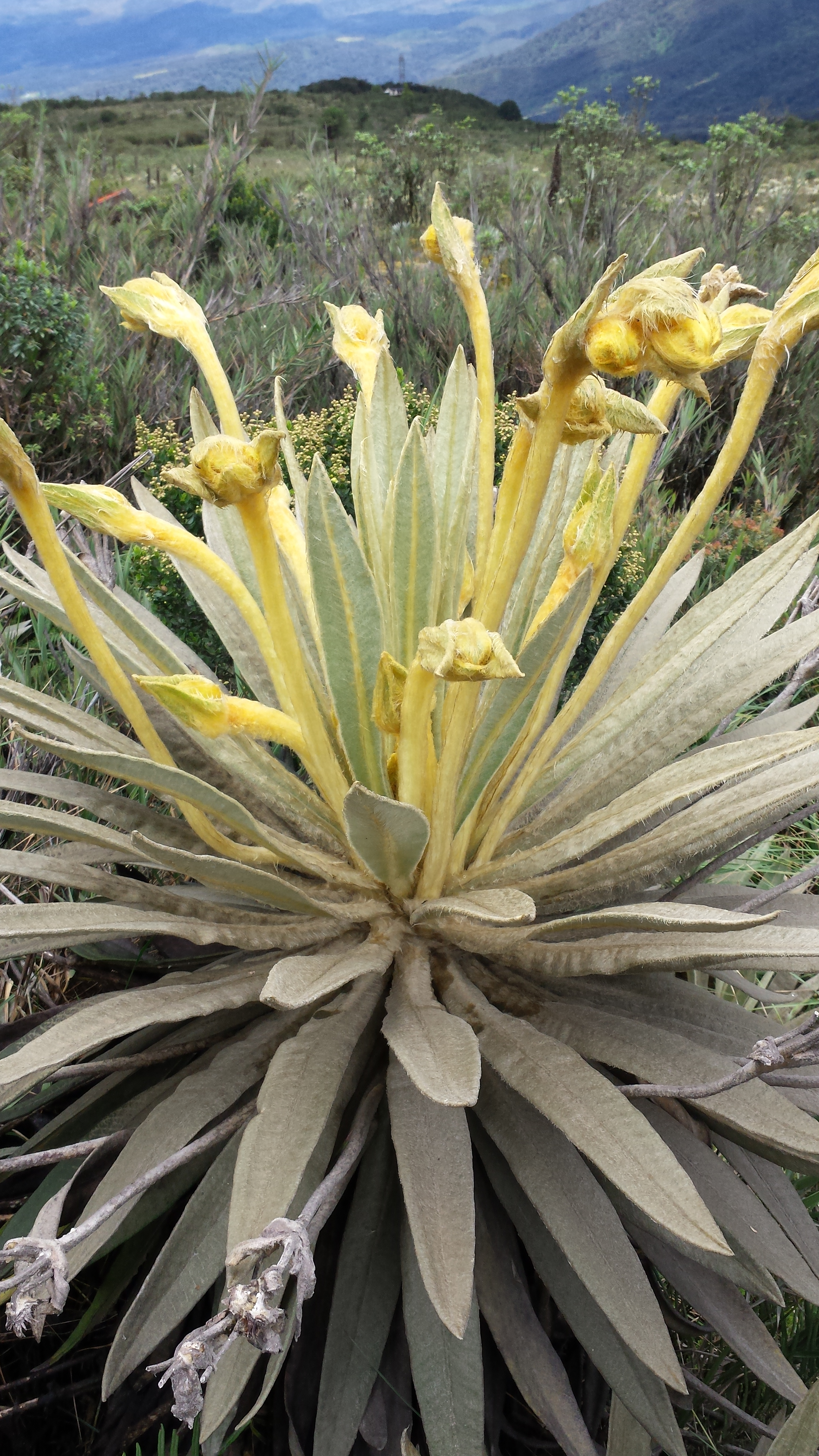 Frailejón (Espeletia killipii), Páramo de Guasca, Cundinamarca, Colombia.